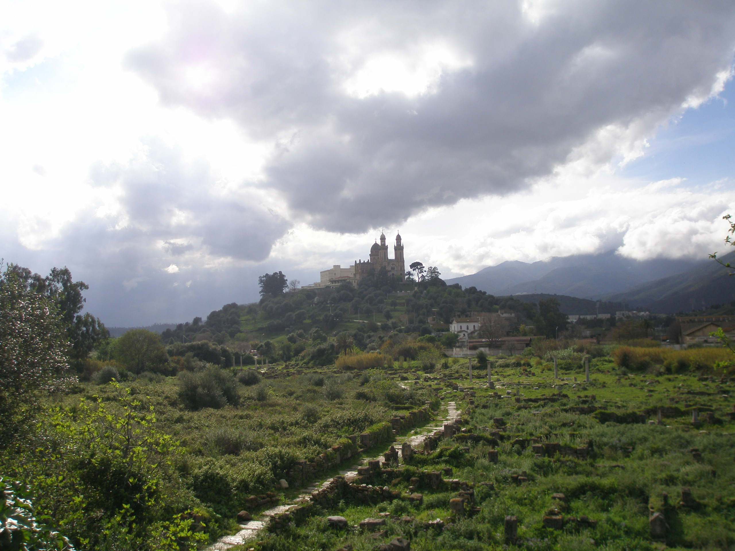 Hippone